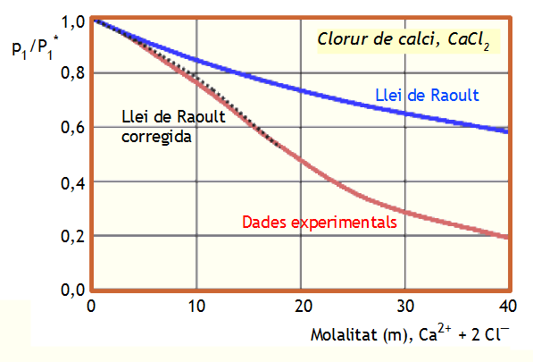 Variació de la pressió de vapor per a dissolucions de clorur de calci de diferents concentracions